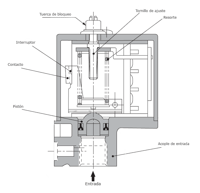 Digrama de un presostato.